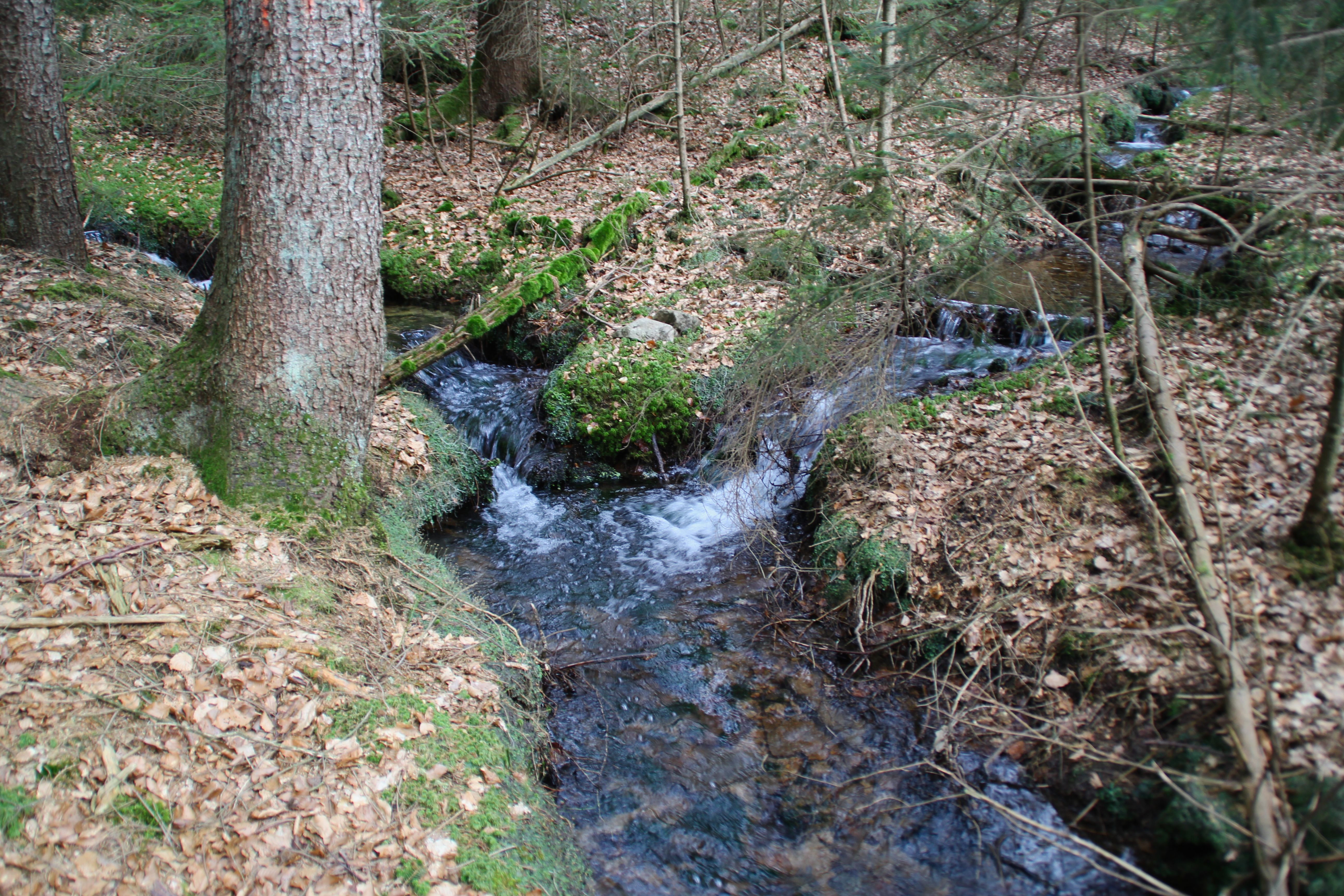 Zusammenfluss der Quellbäche der Speckkahl im Naturschutzgebiet Amphibienfreistätte Speckkahl bei Sommerkahl, Bayern